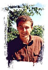 Irfan Škiljan in den 90er Jahren